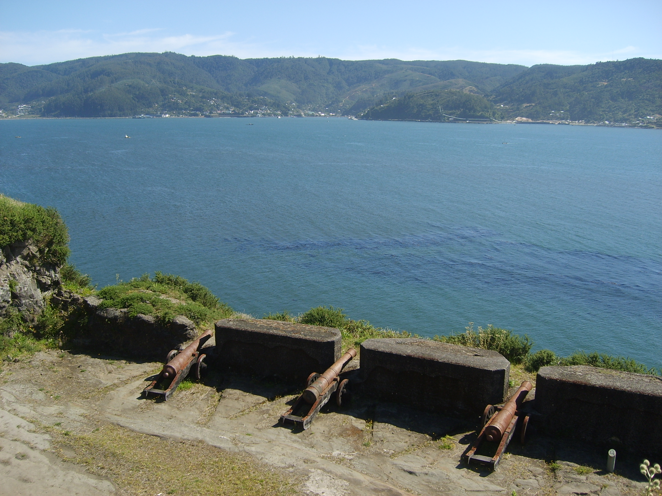 Fotografía de las baterias del Castillo de la Pura y Limpia Concepción de Monfort de Lemus en la ciudad de Valdivia, Chile. Foto obtenida por el autor Valo en Febrero de 2007